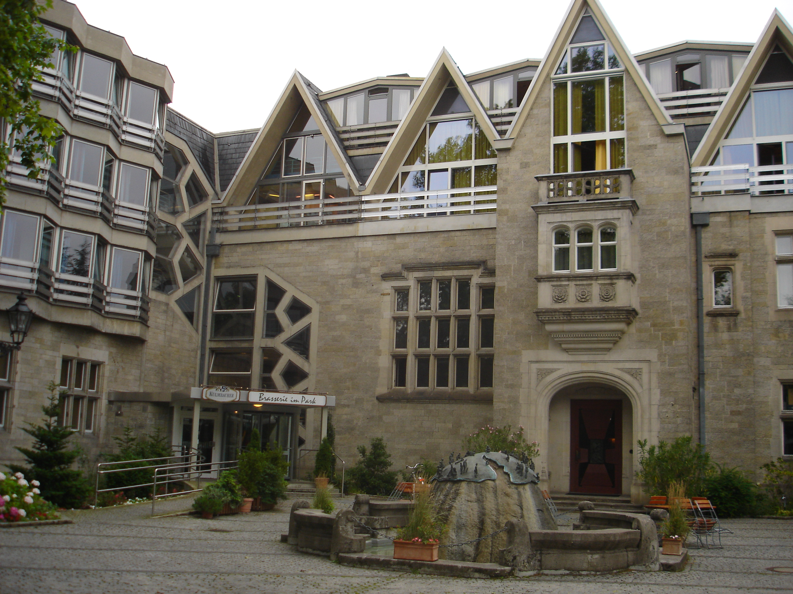 St.-Michaels-Heim